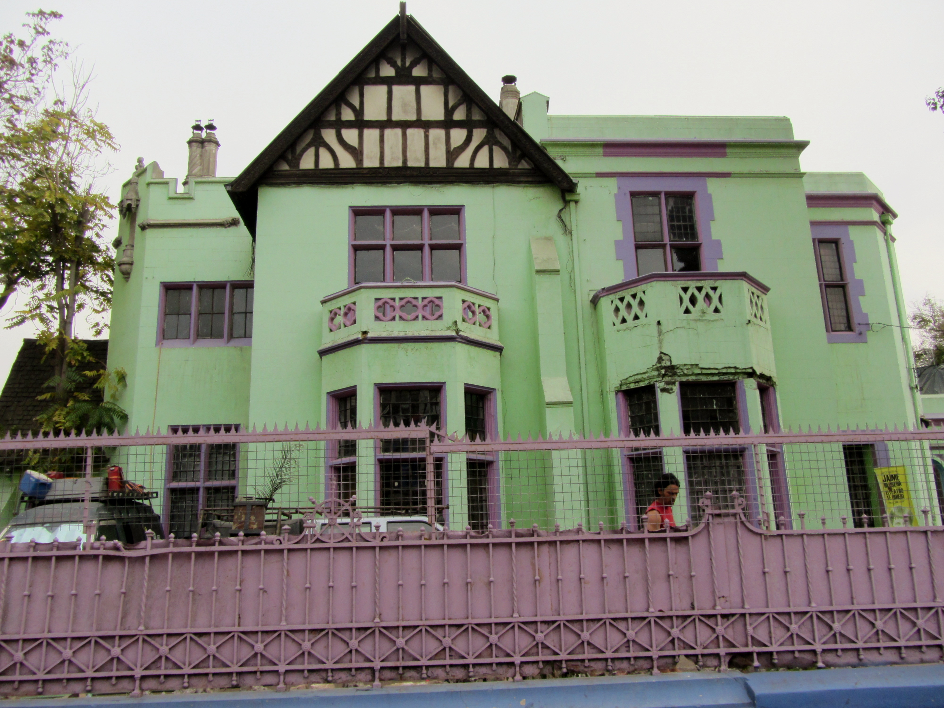 avenida República 301. Casona construida en los años 1930 por el arquitecto Eduardo Costabal Zegers. Al momento de tomar la foto (mayo 2015) era sede de la Fundación Andrés Pérez Araya y el Centro Cultural Gran Circo Teatro